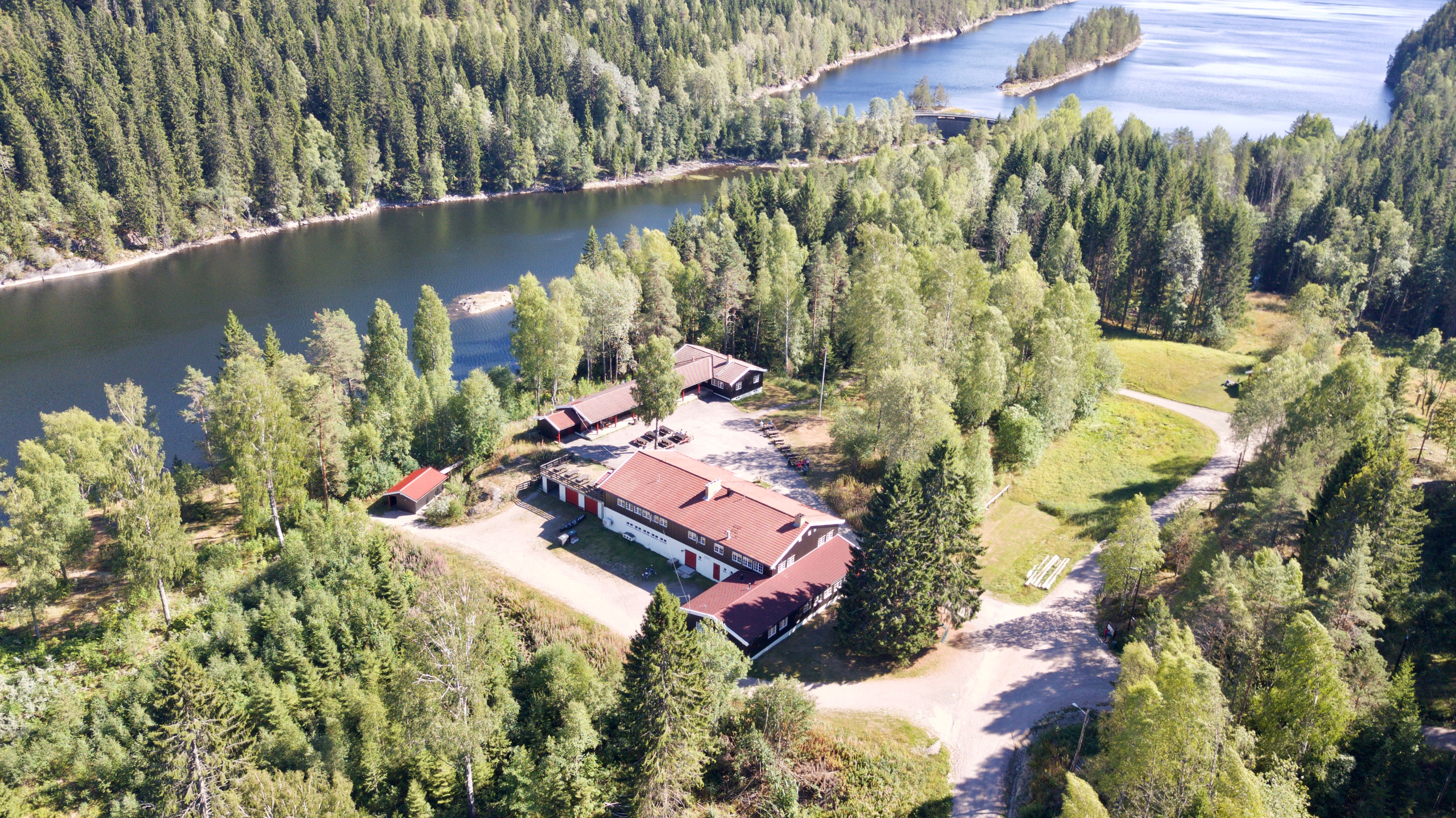 Mariholtet i Østmarka i Oslo. Nord-Elvåga i bakgrunnen